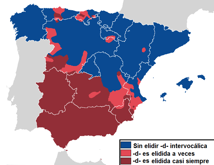 Elusión de la -d- en el español de Europa.